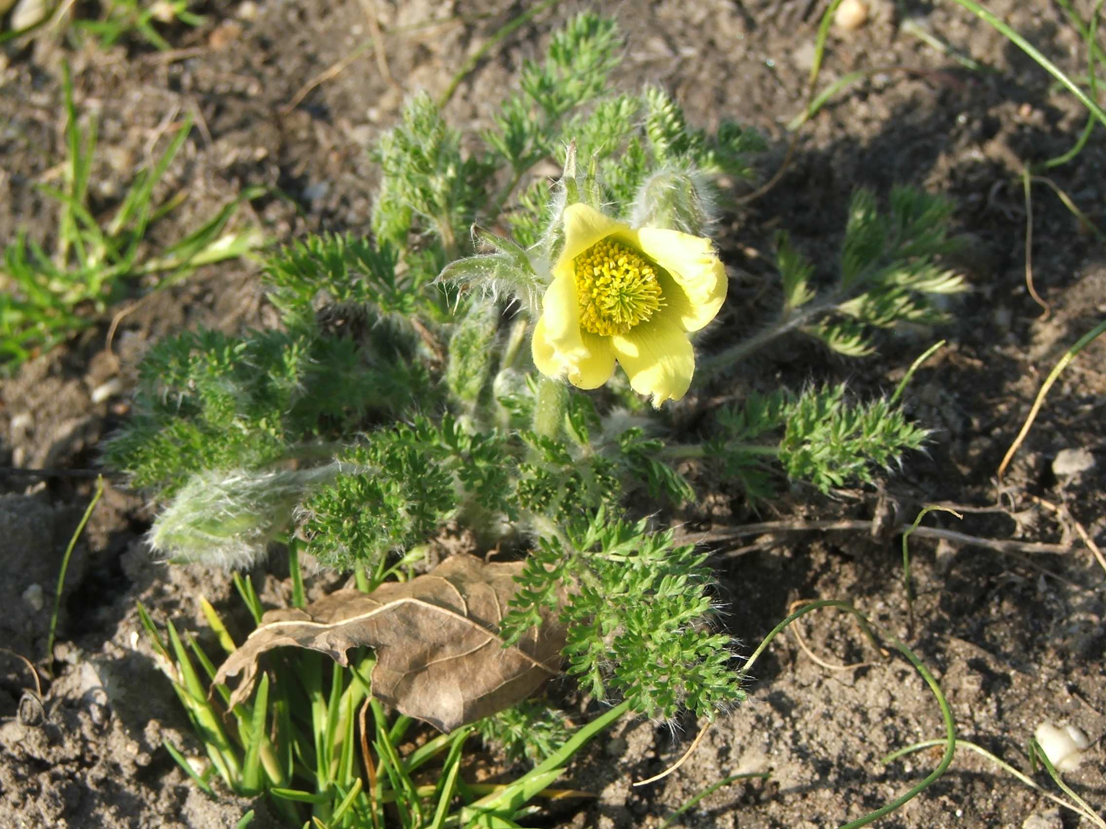 Pulsatilla albana, MTA Botanic Garden (Hungary)